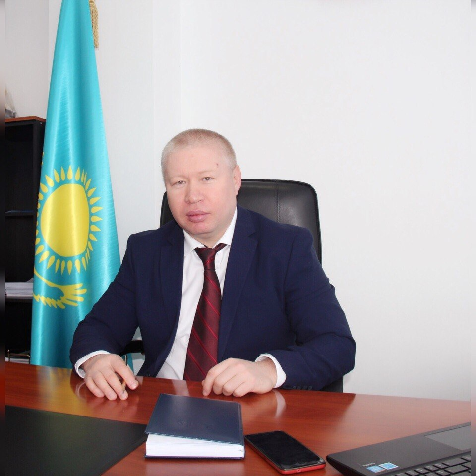 Калин Р.И.